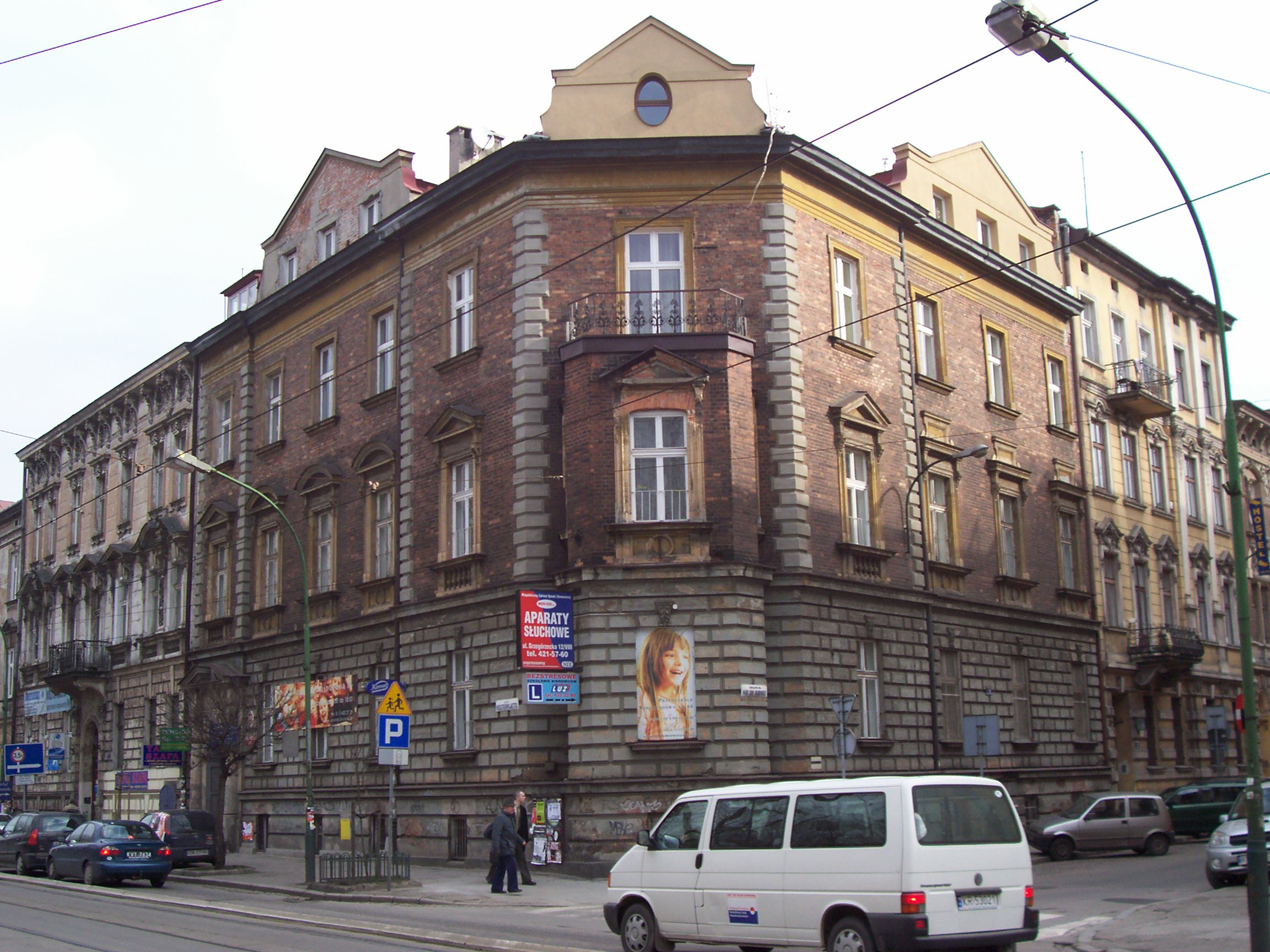 Dawny konsulat Czechosłowacji w Krakowie. Przejeżdża Volkswagen T4.